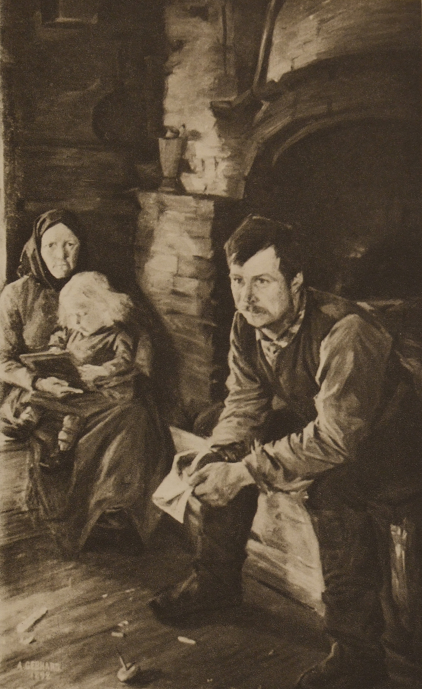 Kansanrunoilija Sahan Kalle